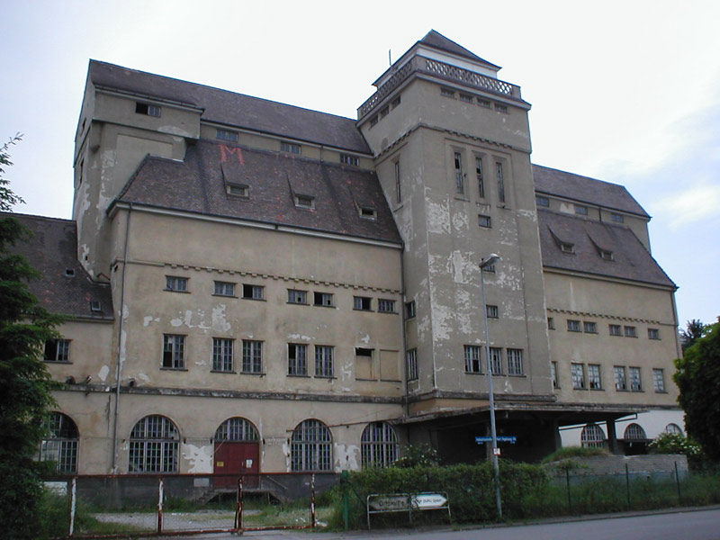 Alte Mälzerei in Haßmersheim, erbaut während des Ersten Weltkriegs